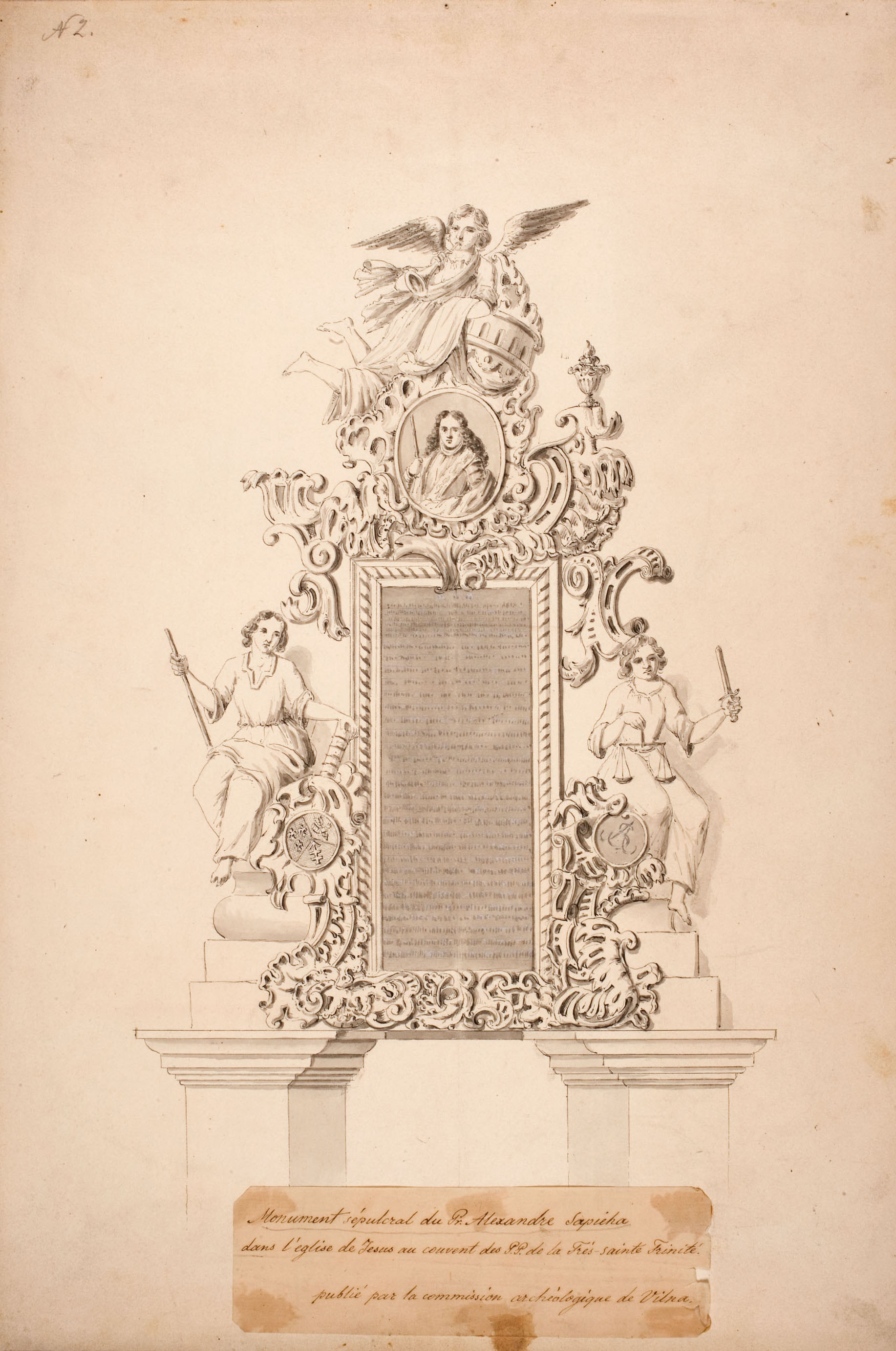 Беларуская (тарашкевіца): Надмагільле Аляксандра Паўла Сапегі (Alaksandar Pavał Sapieha) у Вільні